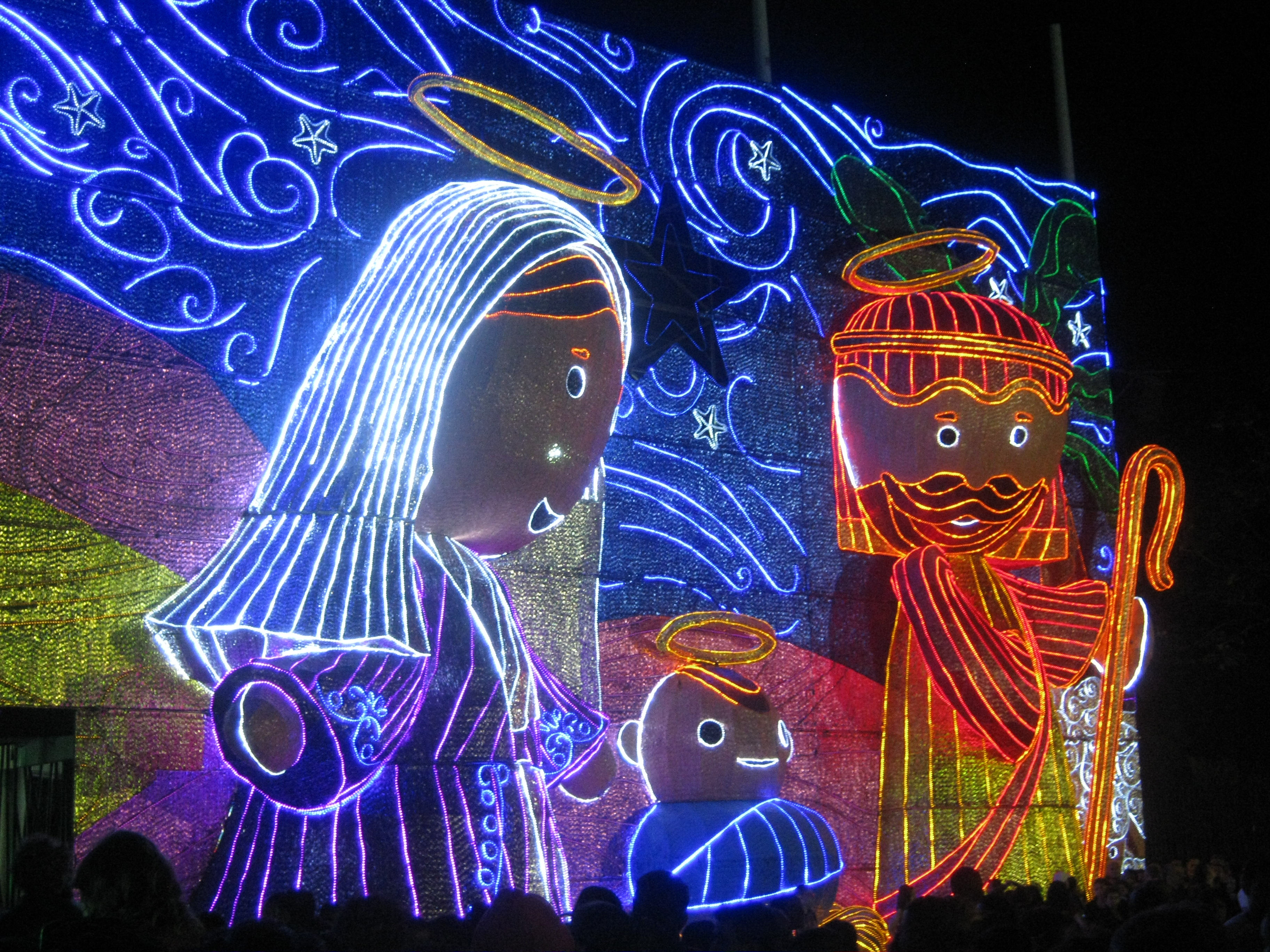 Alumbrados navideños 2017 en el sector Parque Norte, Medellín, Colombia.